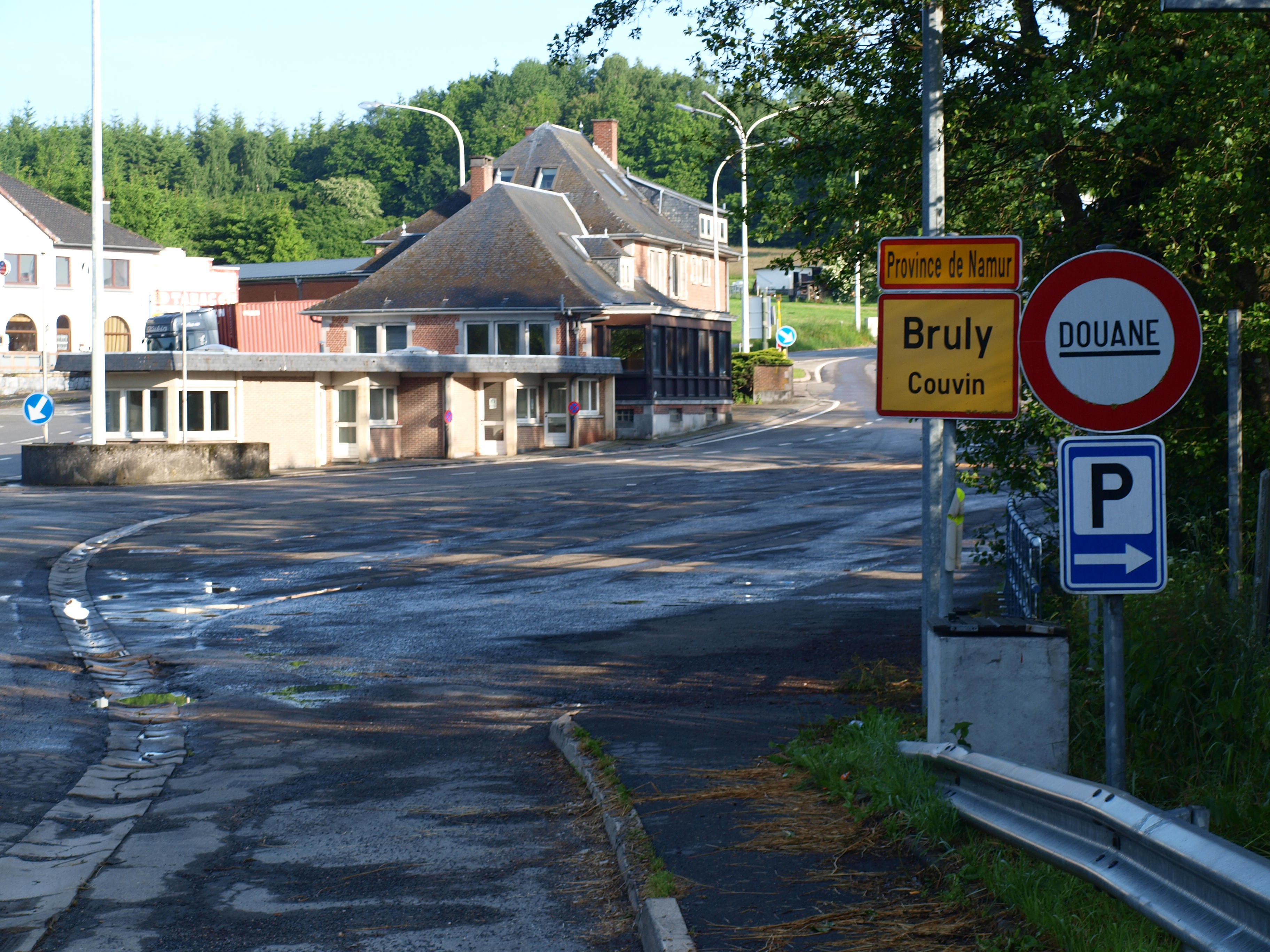 Gué-d'Hossus (Ardennes, France) & Brûly (Namur, Belgique) , le poste franc-belge de la douane.